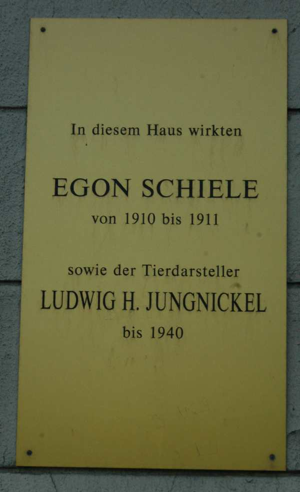 Gedenktafel für Schiele und Jungnickel, Grünbergstraße 31